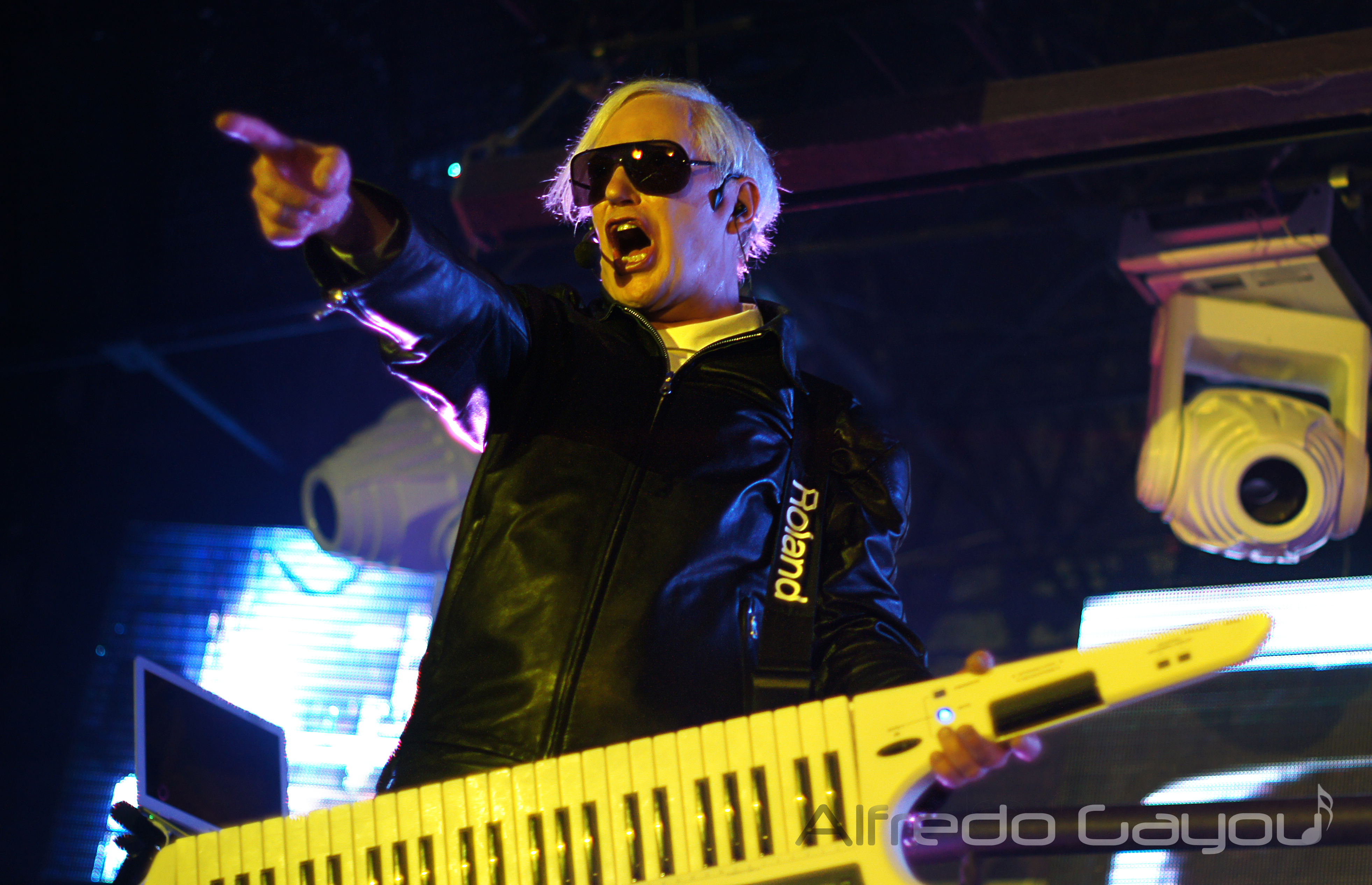 Pascal Languirand, kanadyjski muzyk, założyciel zespołu Trans-X.